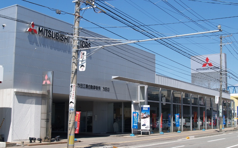 秋田三菱自動車販売本社・秋田店（秋田市川元開和町、秋田県道56号秋田天王線沿い）